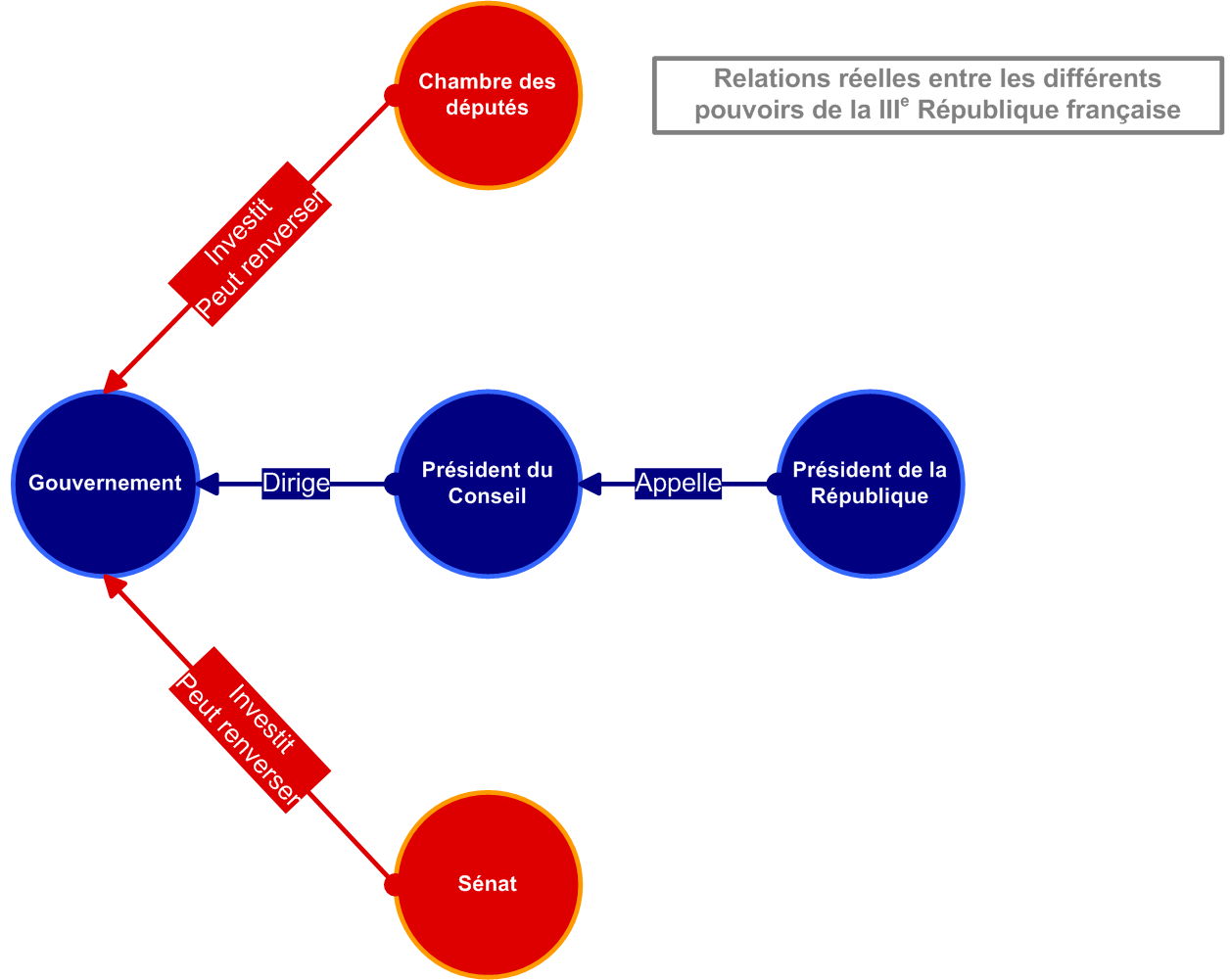 Organigramme simple des relations réelles entre les différents pouvoirs institutionnels de la Troisième République française.